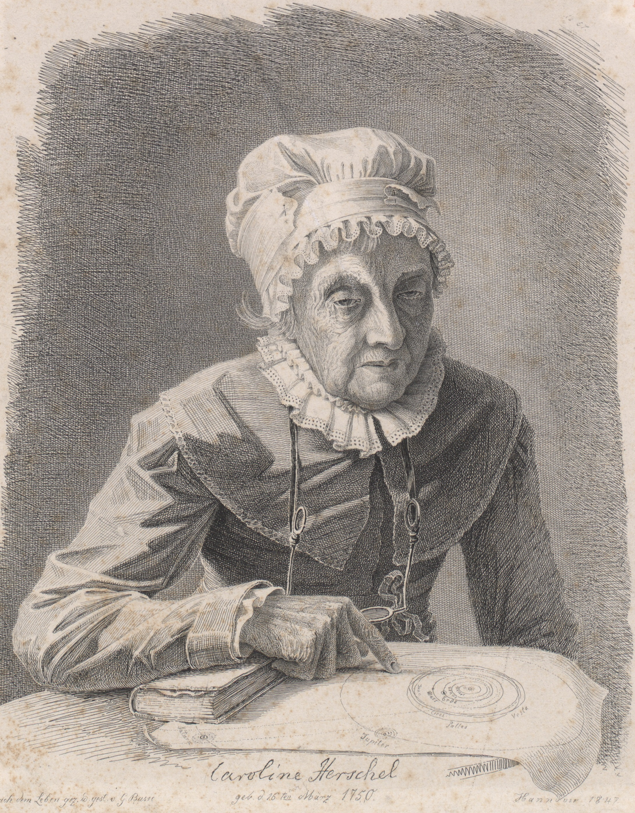 Caroline Herschel, geb. d. 16ten März 1750. Nach dem Leben gez.und gest. v. G. Busse, Hannover 1847